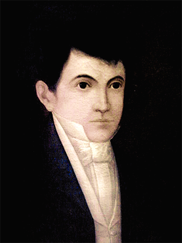 Peruvian writer Mariano Melgar